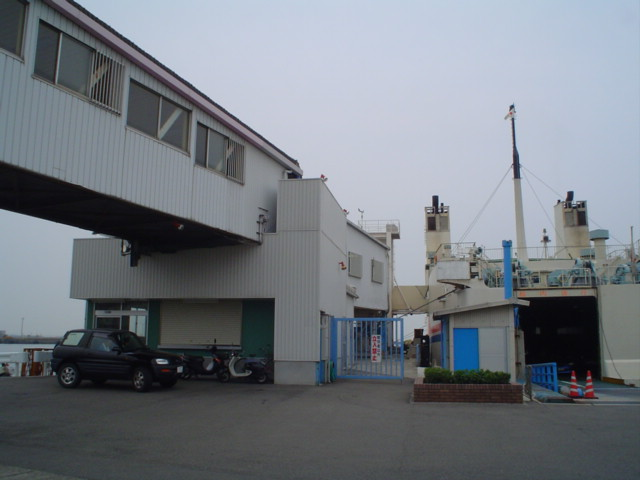 Pier of Wakayama Port (和歌山下津港) for Tokushima (Nankai Ferry), Wakayama City, Wakayama Pref., Japan